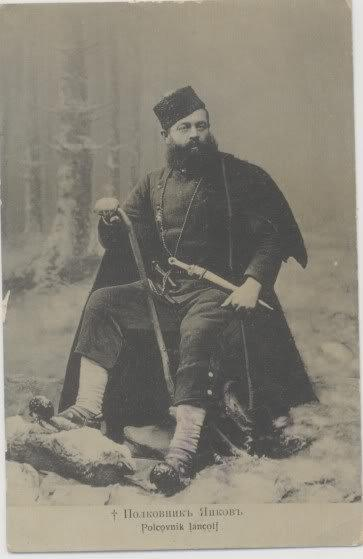 Полковник Анастас Янков